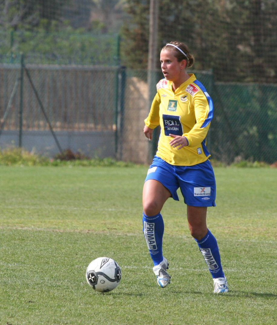 Fotballspilleren Kristin Lie